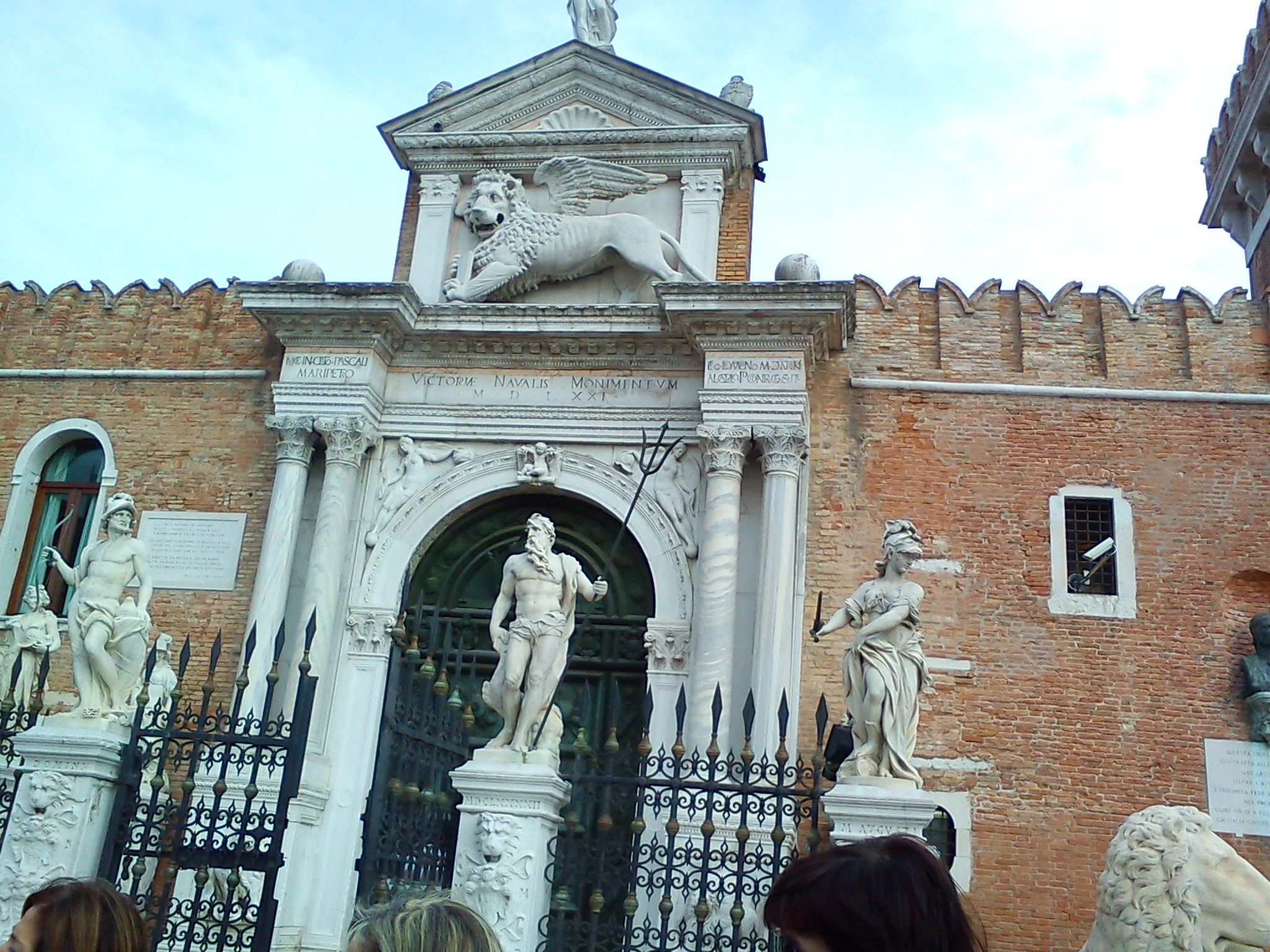 entrata per l' Arsenale di Venezia con le due statue